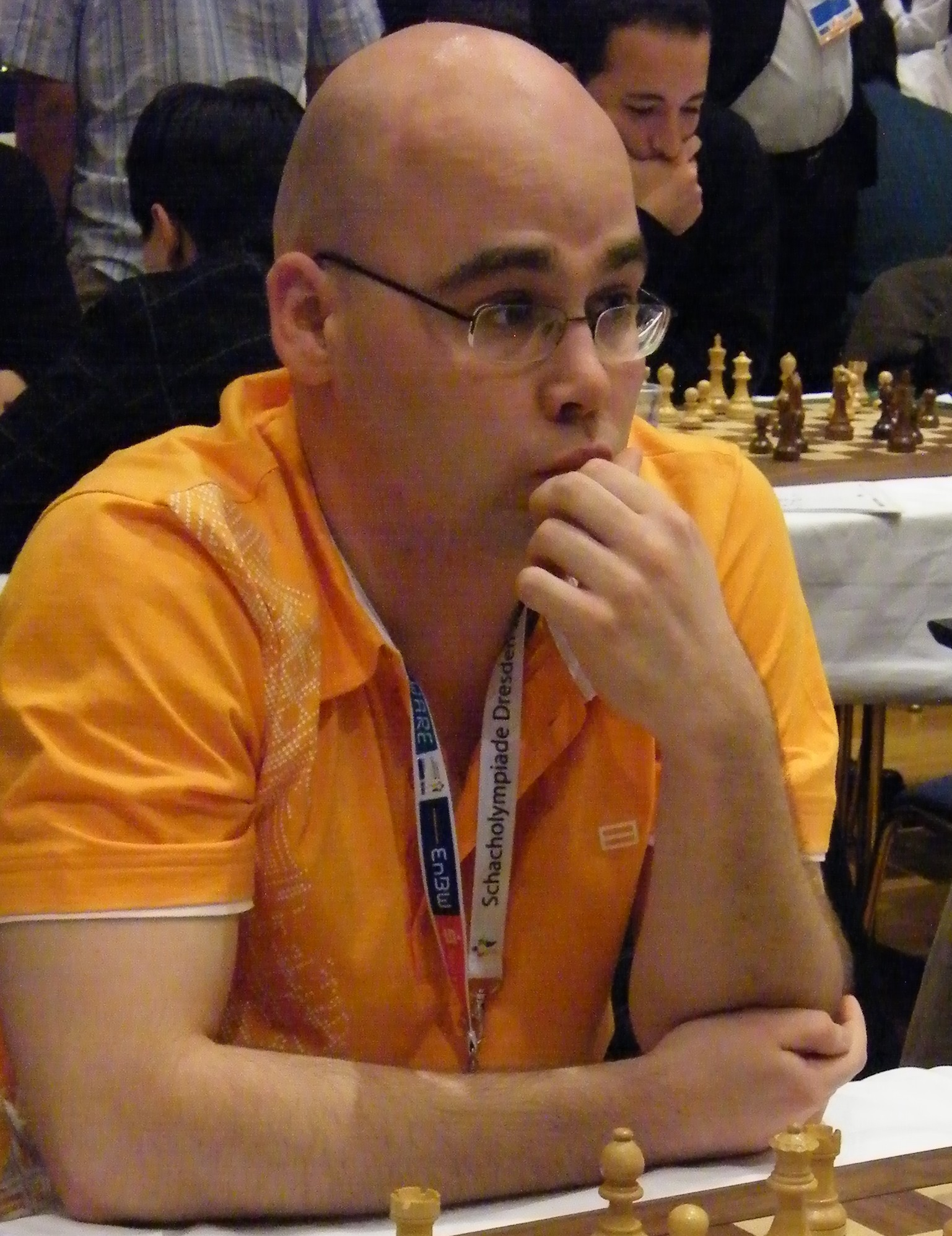 GM Meelis Kanep bei der Schacholympiade 2008 in Dresden